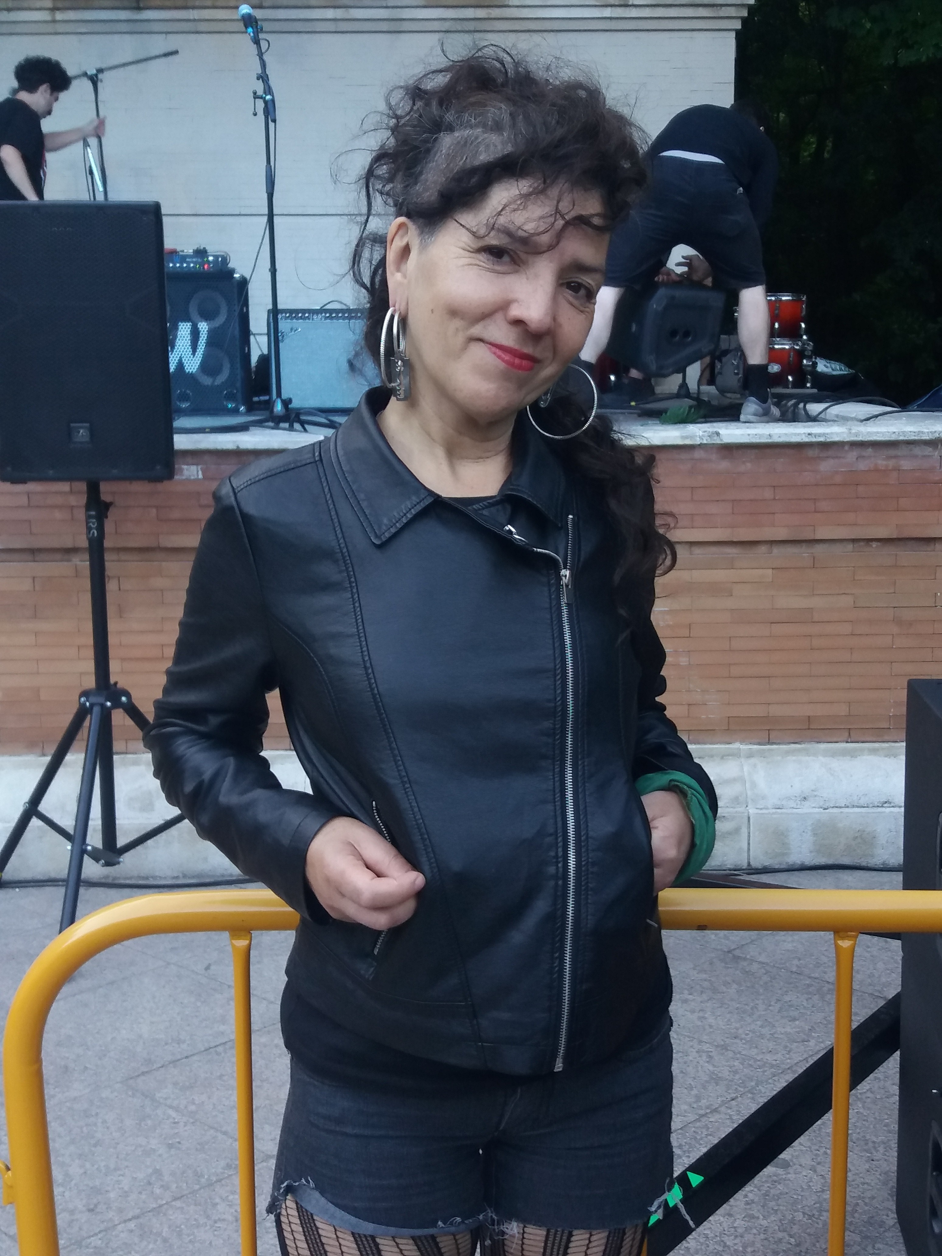 La cantante Patricia Pietrafesa en un concierto del grupo argentino Kumbia Queers en la pérgola del Campo Grande de Valladolid (España)